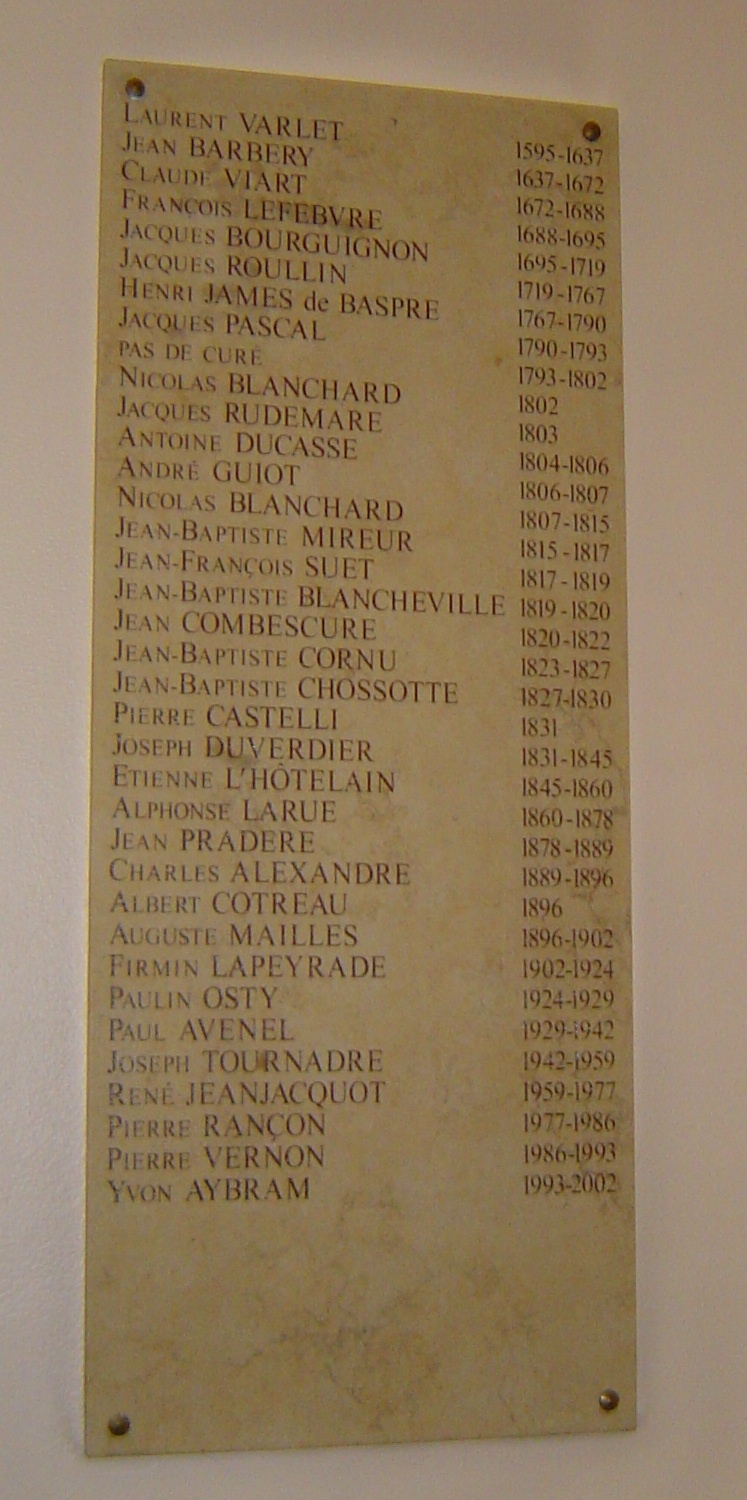 Photos prises à Bourg-la-Reine, commune française des Hauts-de-Seine